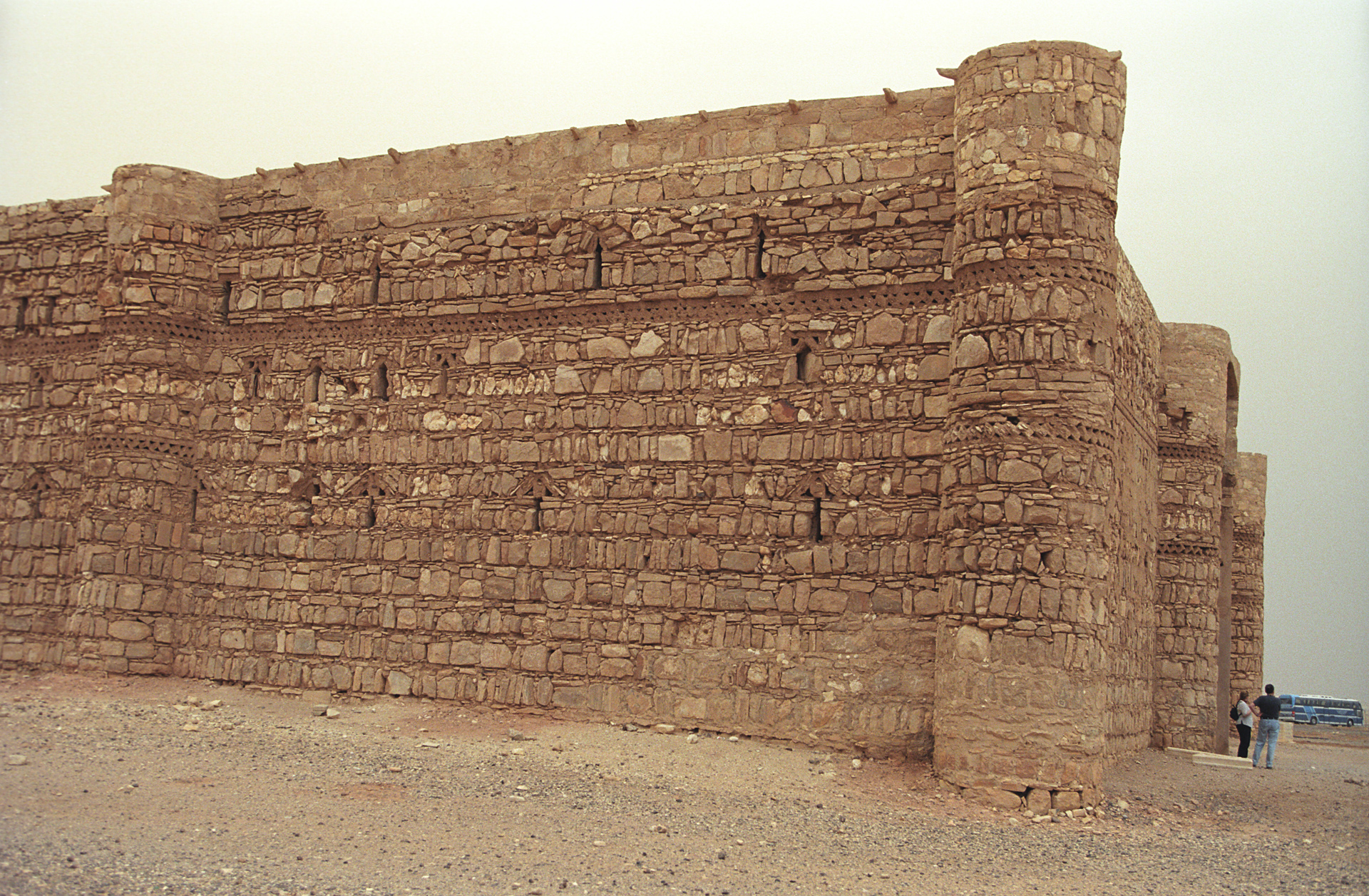 Qasr Kharana , Desert Castles - Jordan